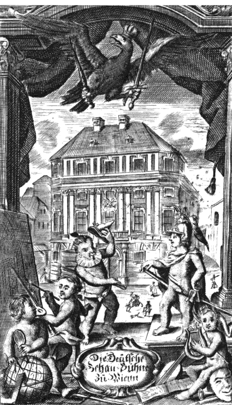 Titelkupfer aus "Die Deutsche Schaubühne zu Wienn,nach alten und neuen Mustern, Sechster Theil"